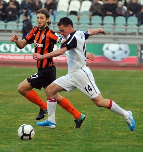 Парит Джихани и Дмитрий Чигринский